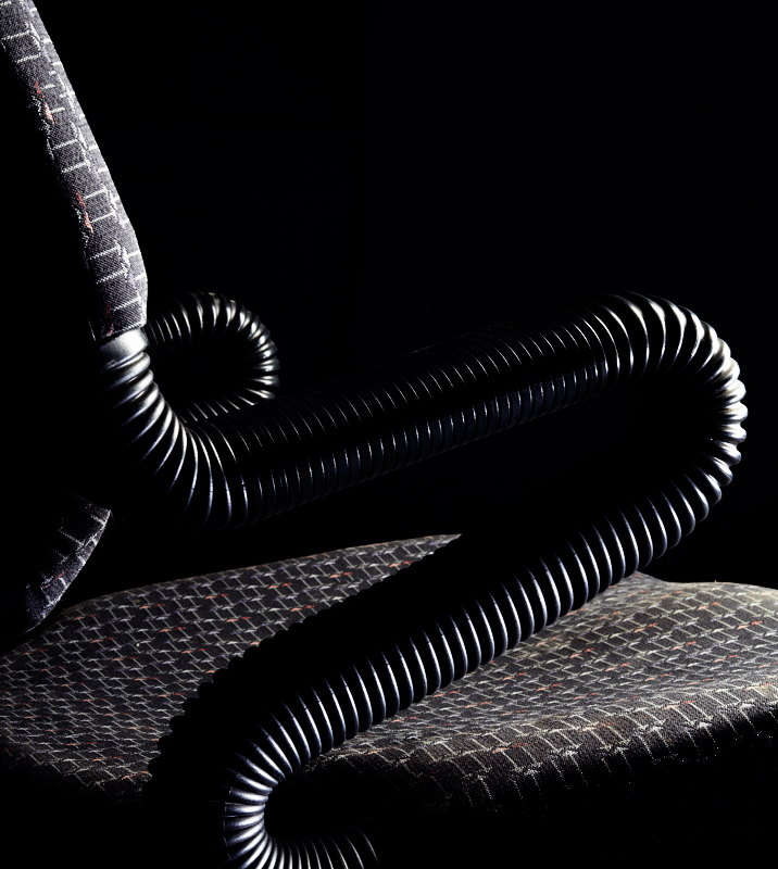 Vertabrae Chair Emilio Ambasz